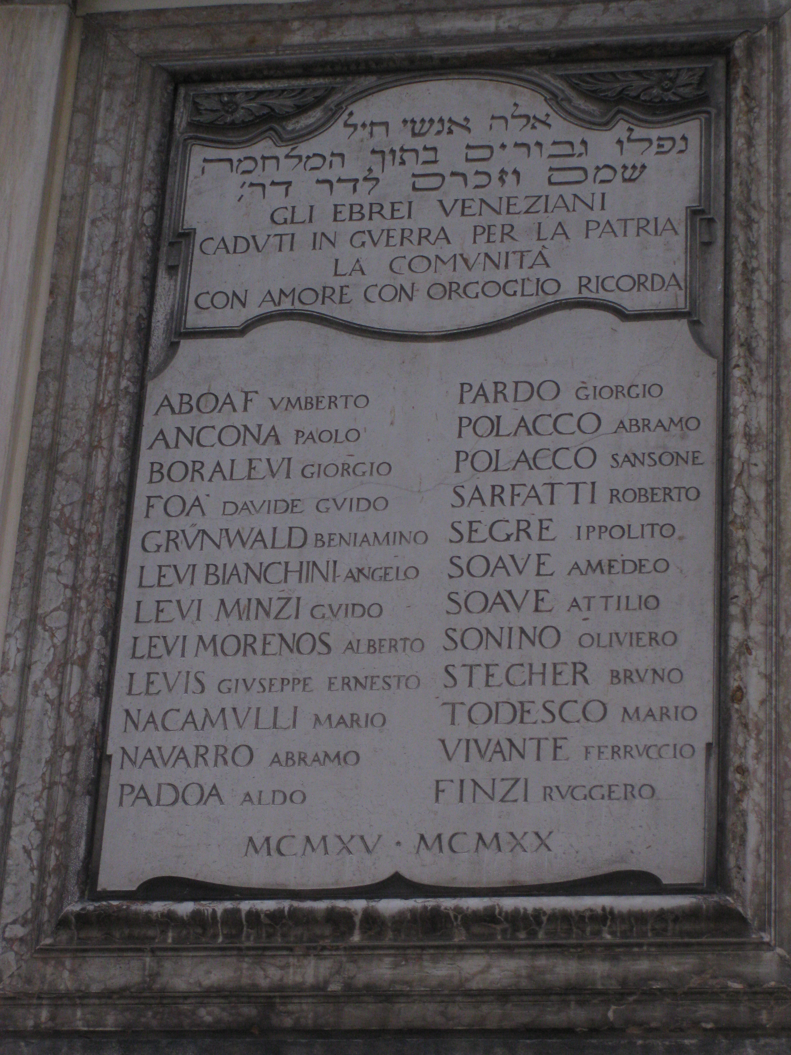 Ghetto הגטו של ונציה אנדרטה לנופלים במלחמת העולם הראשונה על קיר בית הכנסת הלוונטיני